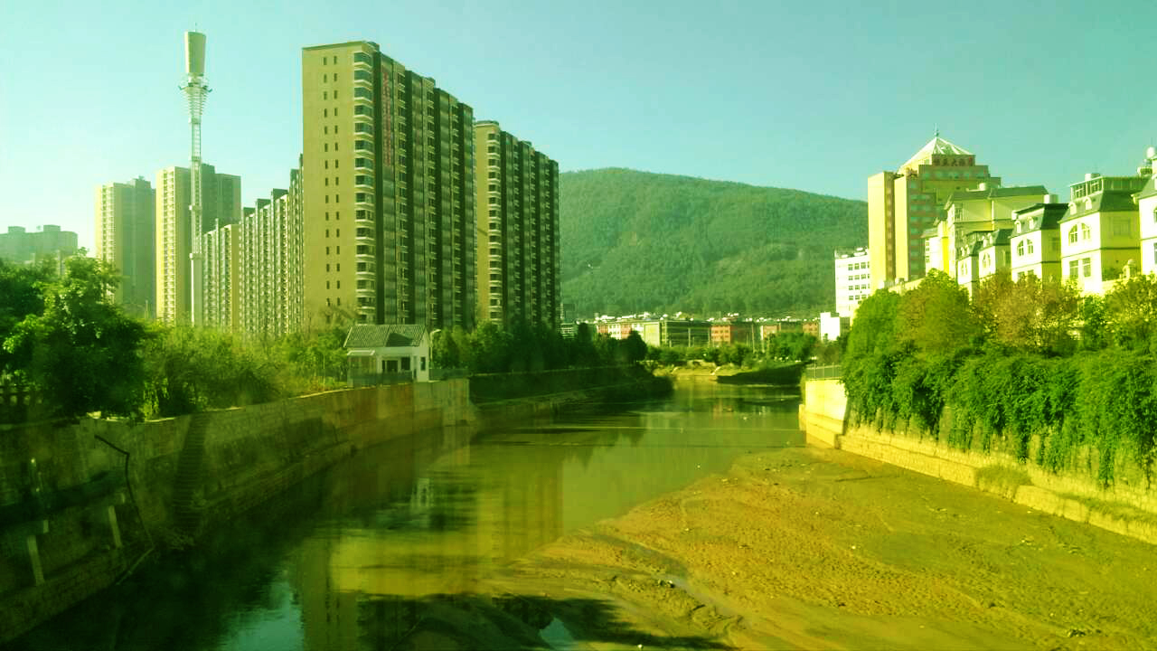 中国云南禄劝县城的掌鸠河，拍摄于东山路，面向南。